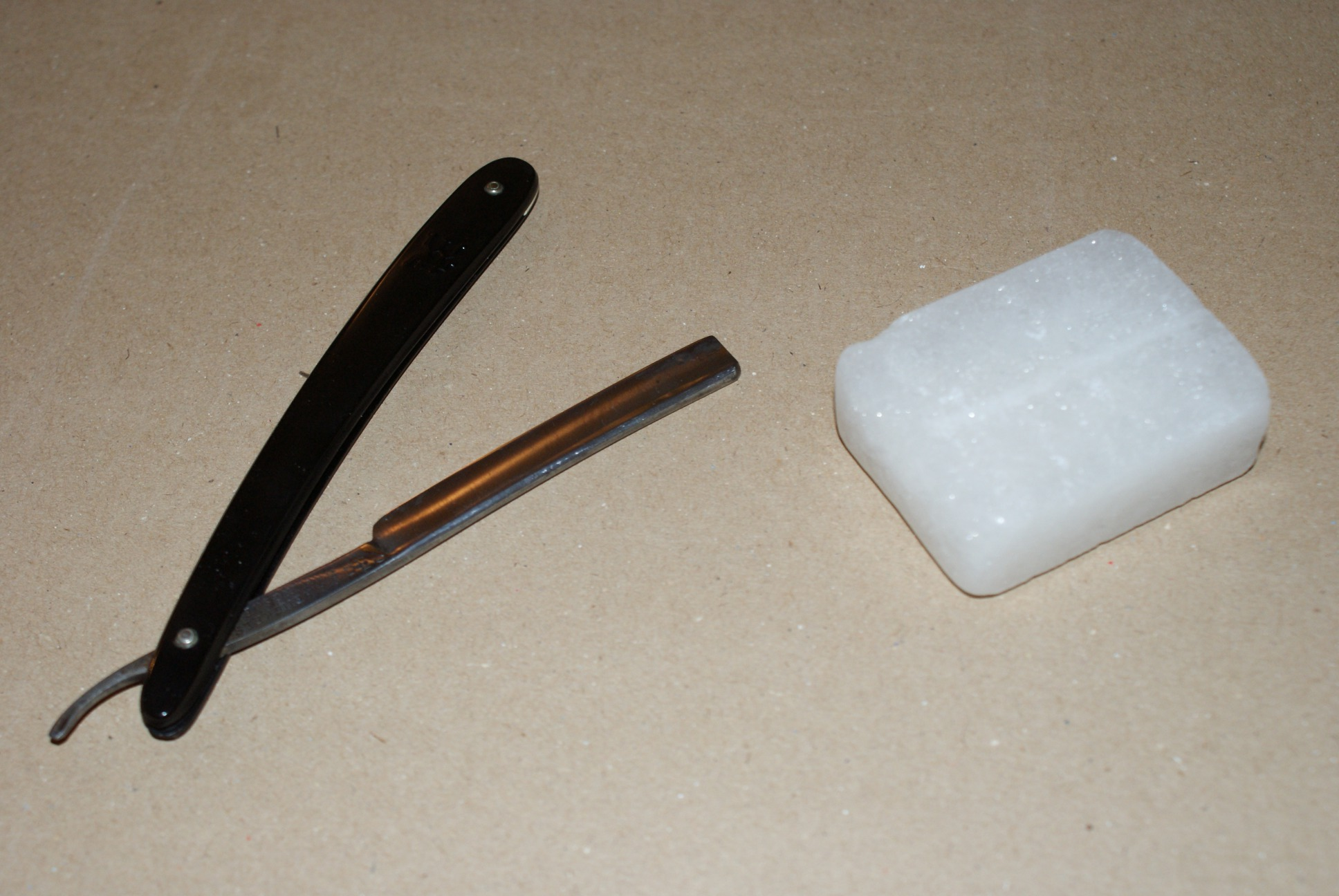 Ein Block Alaun neben einem Rasiermesser